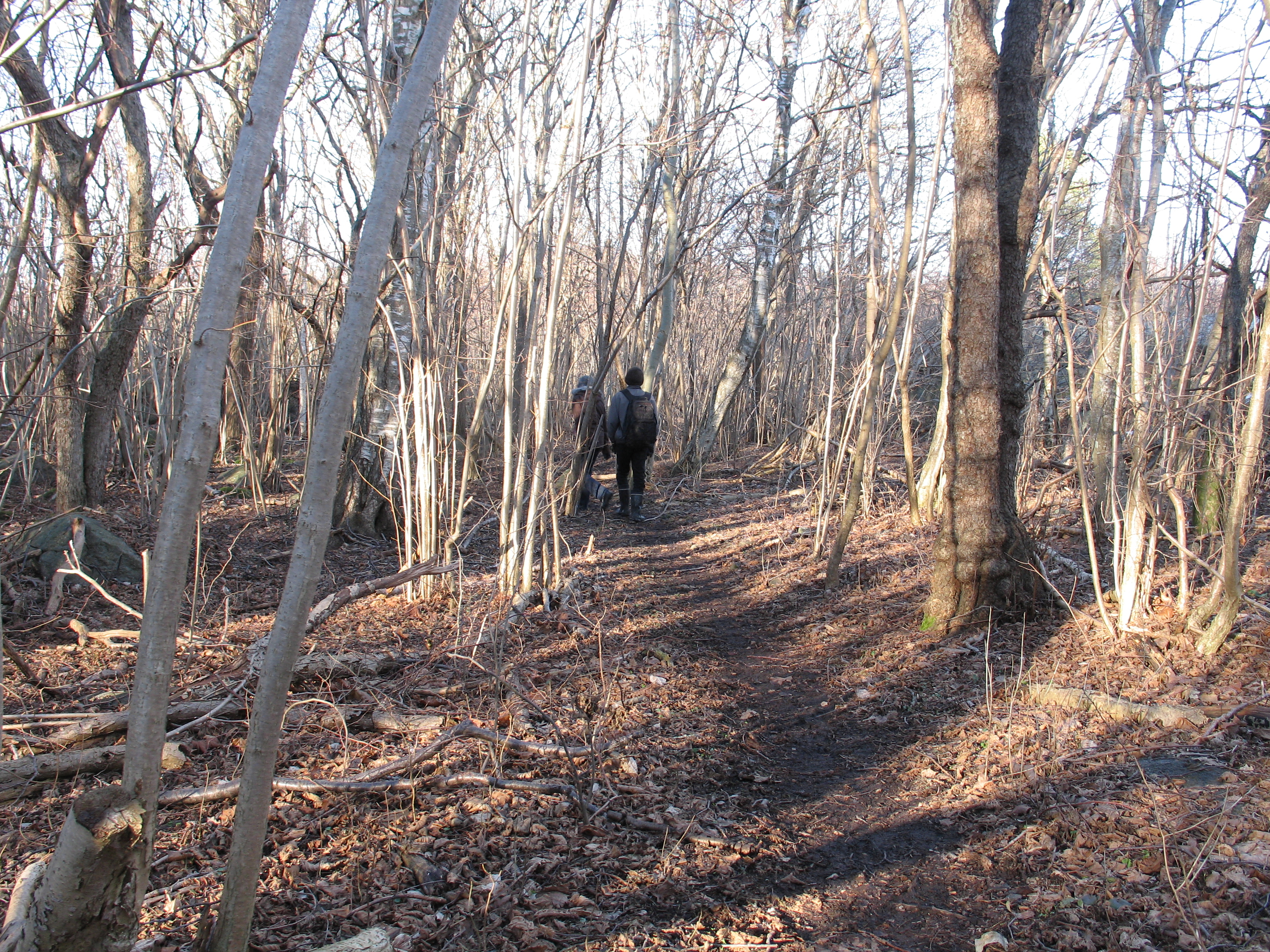 Fra Storemyr-Fagerbakken landskapsvernområde på Hvasser i Tjøme kommune.